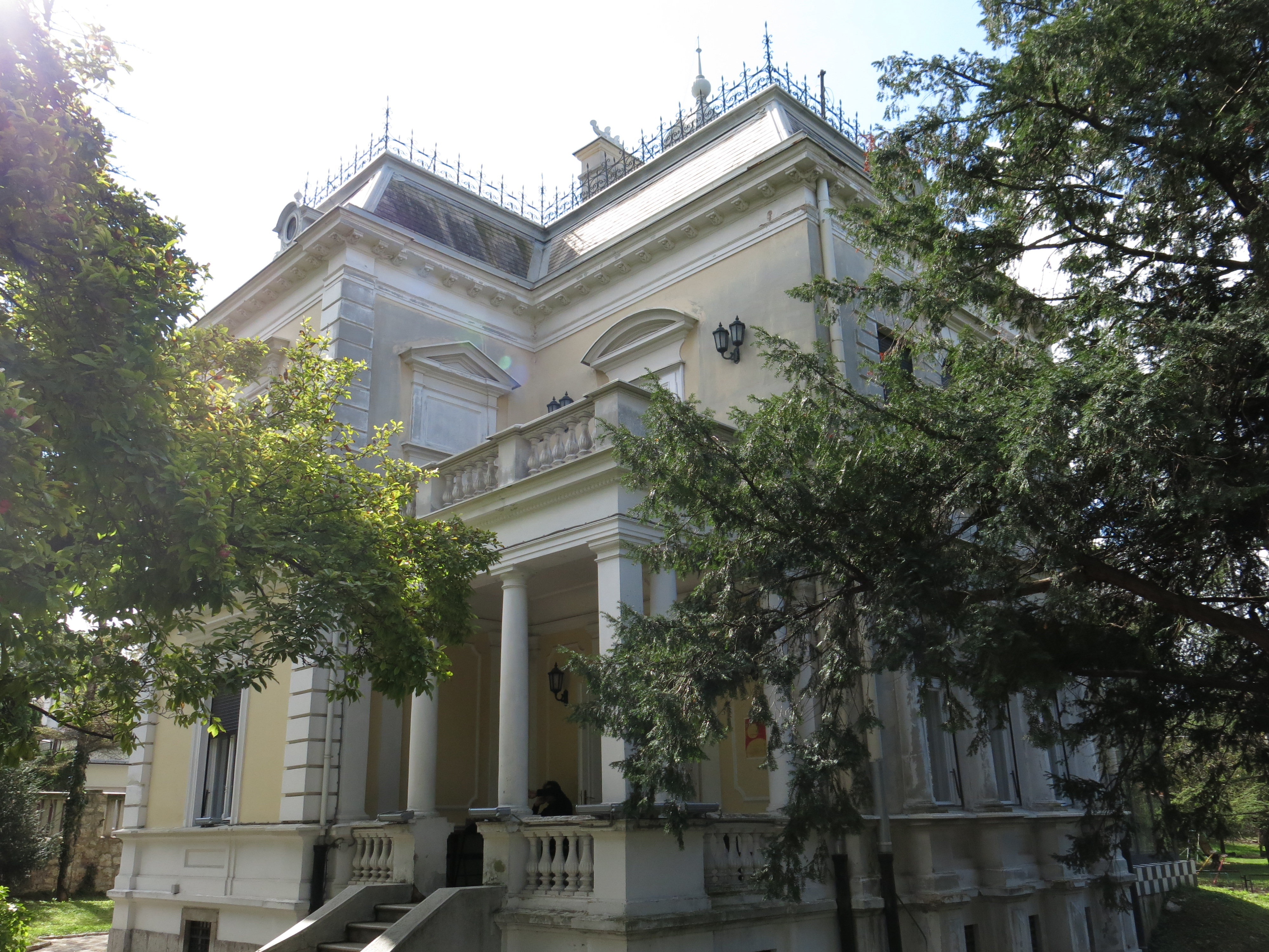 Кућа краља Петра I Карађорђевића